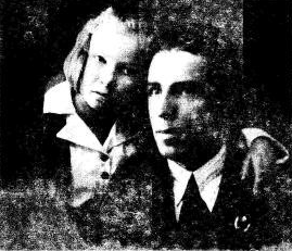 Foto de Vladimir Varankin kun la filino, 1937.